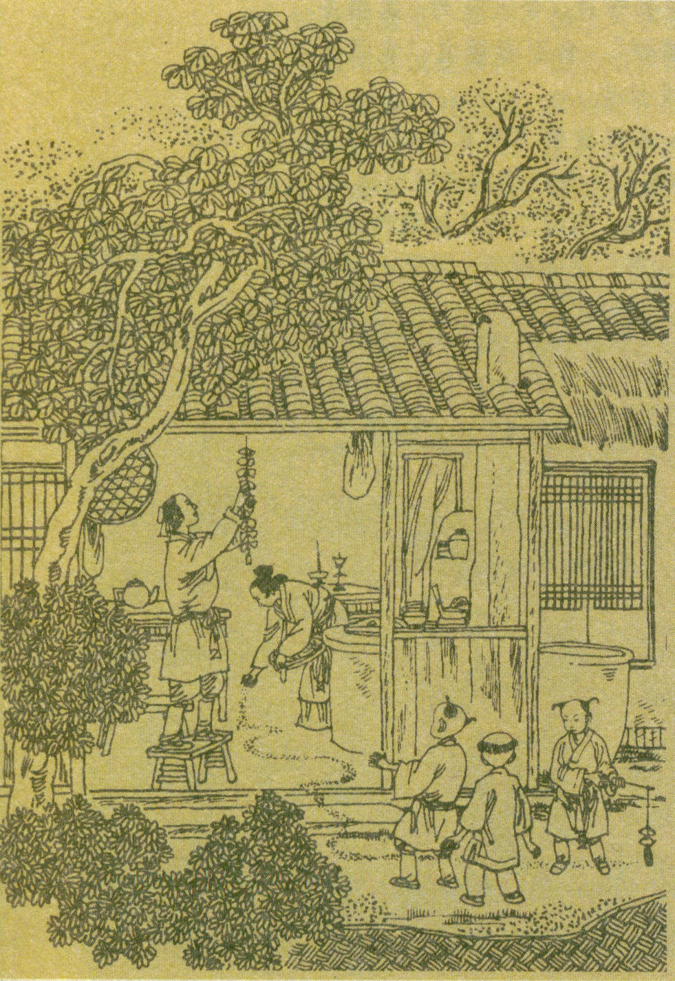 中文（香港）: 端午掛香囊、撒灰除蟲